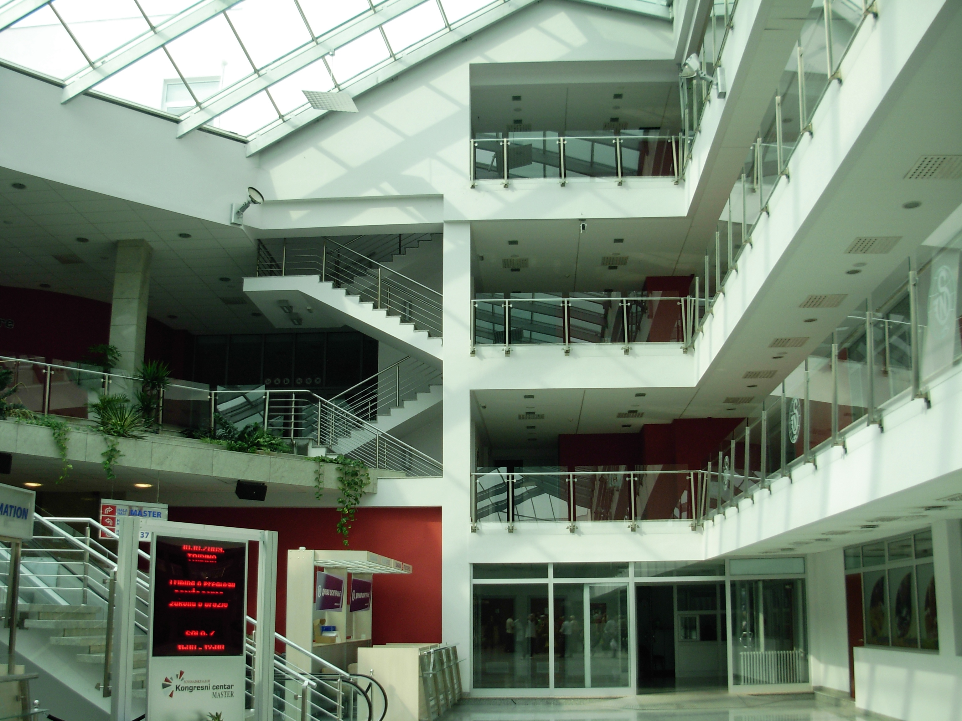 Unutrašnjost master centra Novosadskog sajma. Oktobar 2009. godine - sajam lova i ribolova.